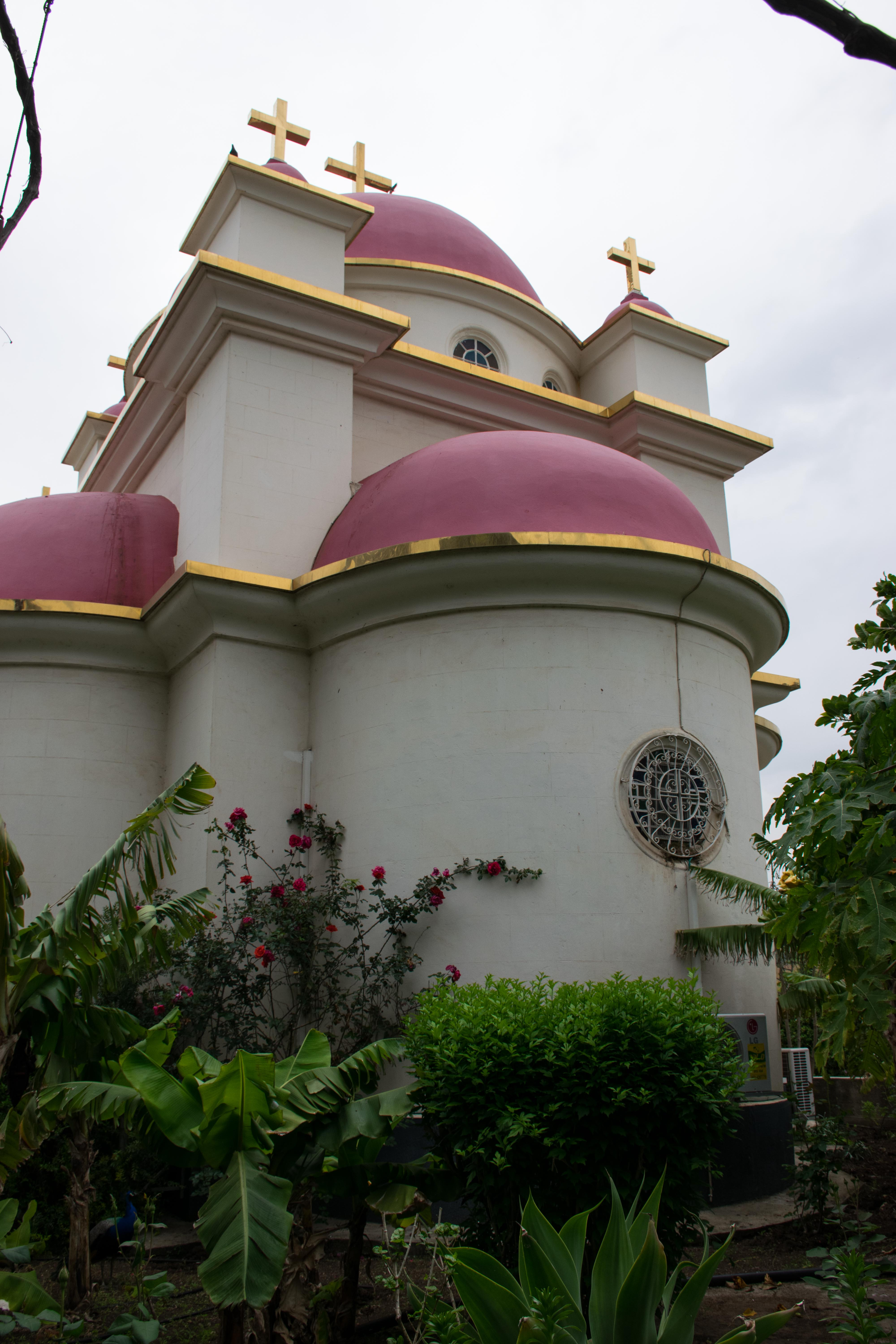 DSC_1694.jpg Tiberias